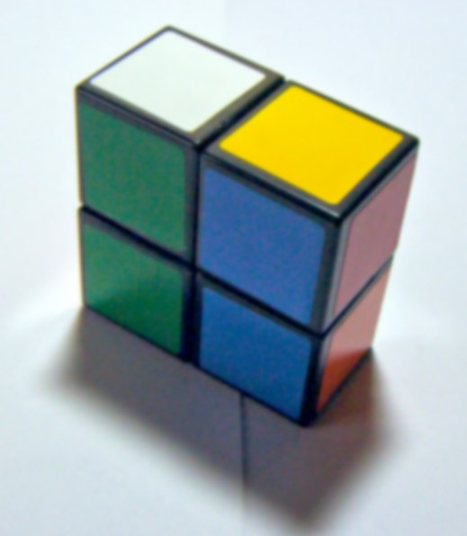 中文（台灣）: 轉亂後的2x2x1魔術方塊